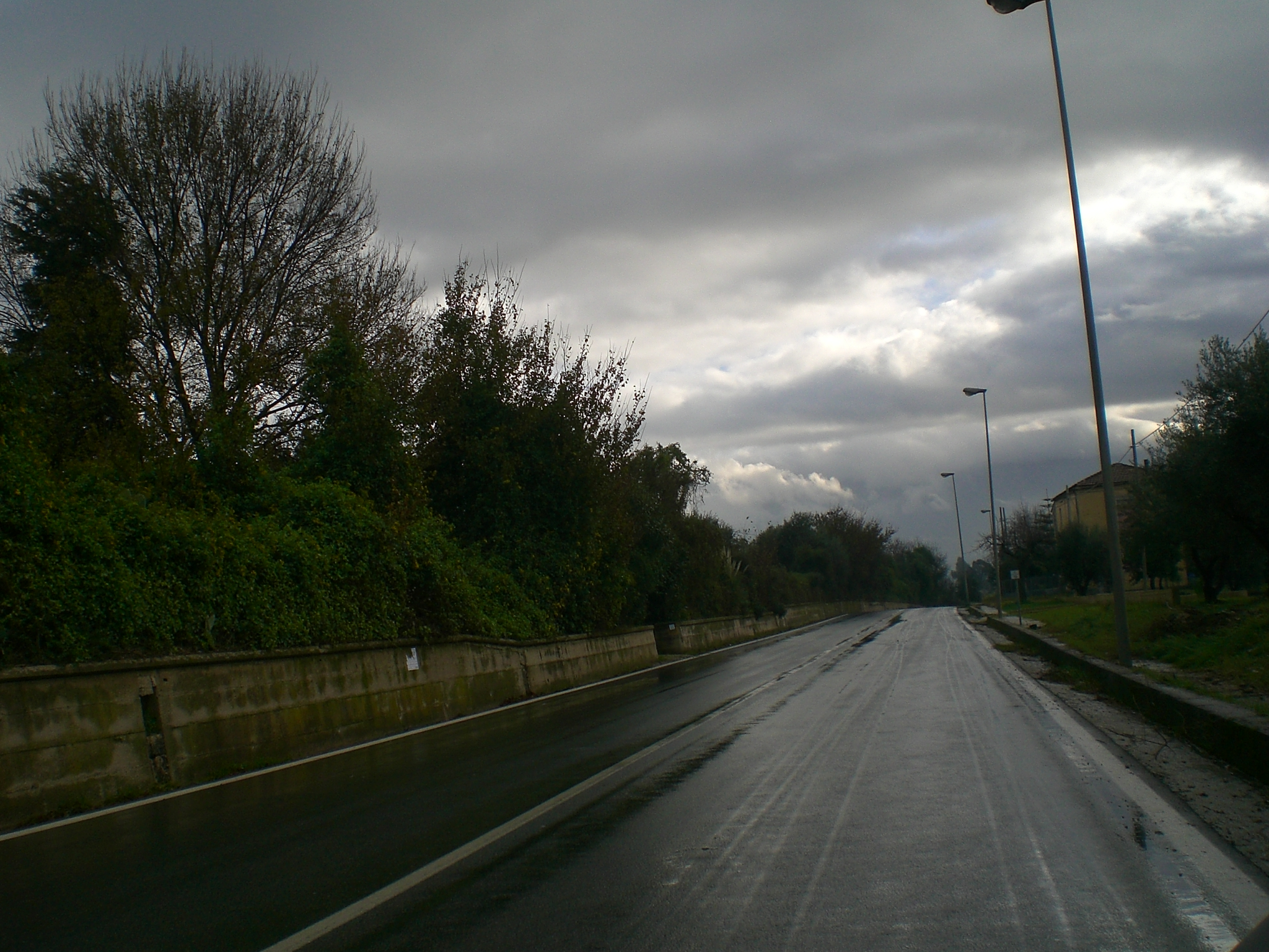 La strada statale 19 in località Castrullo di Campagna